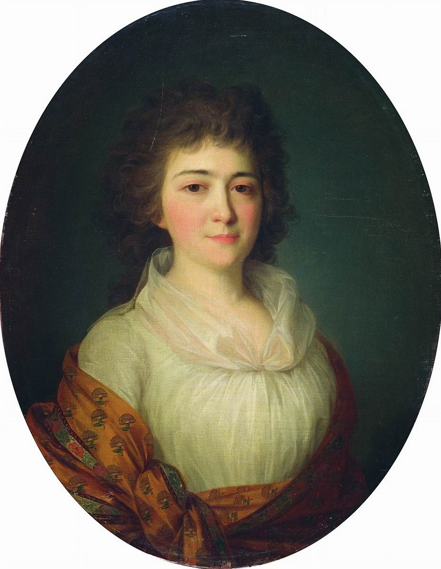 Аграфена Михайловна Дурасова, в замужестве Писарева (176.-1835), владелица подмосковных имений Горки и Люблино, а также большого загородного дома с садом за Спасскими воротами.